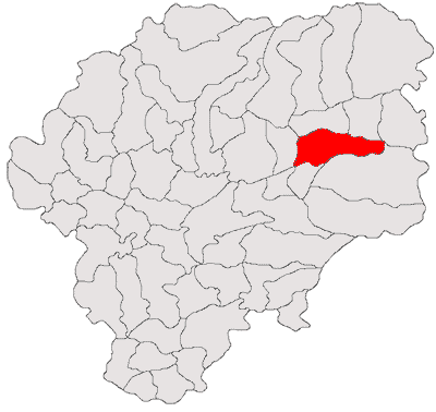 Categorie:Hărţi ale judeţului Bistriţa-Năsăud